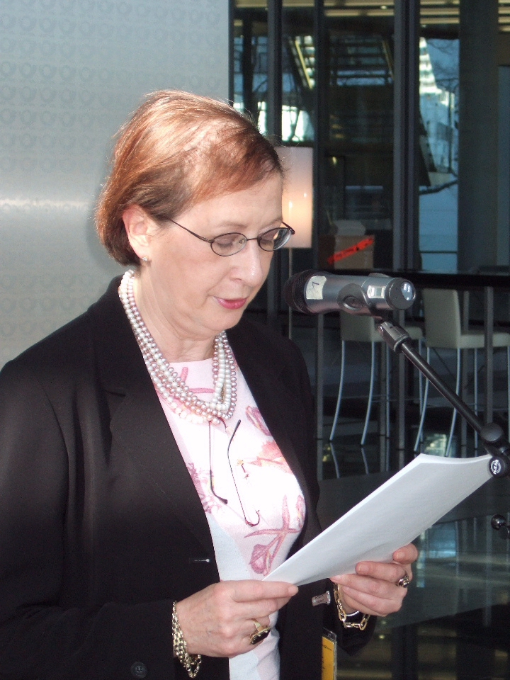 Heide Simonis im Bonner Posttower.